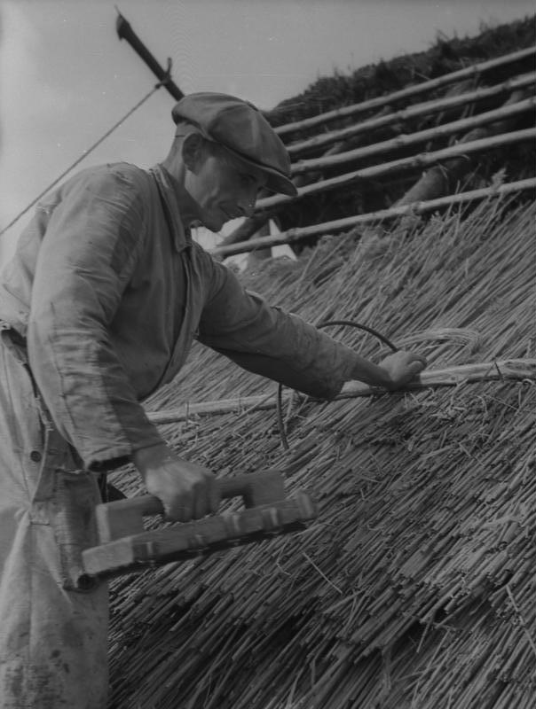 Beim Dachdecken. Viele Siedler decken ihr Haus mit Rohr. In der Gegend von Garz an der Oder. 2788-49